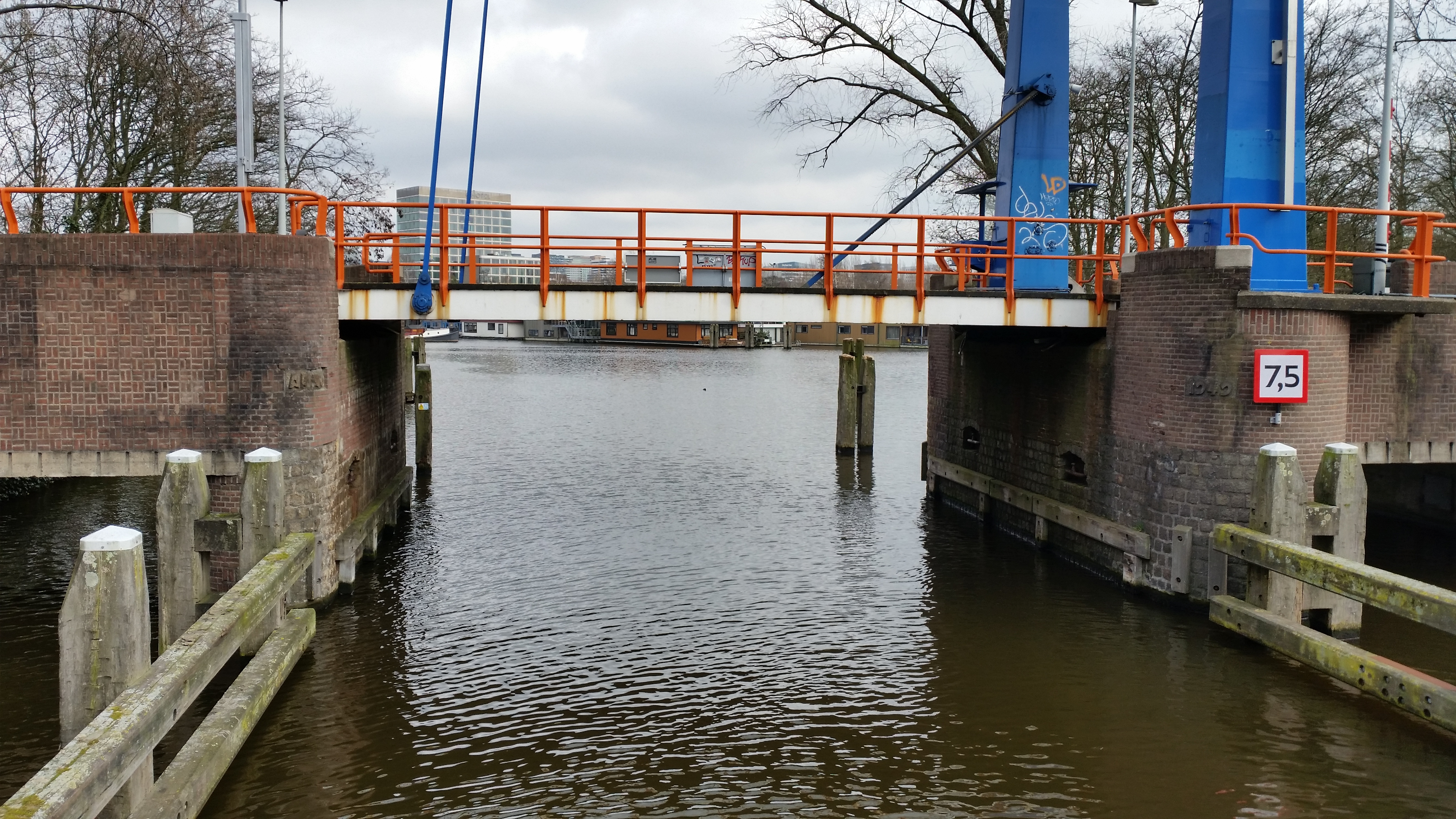 Brug van Brug 307, Riekerhavenbrug met op de pijlers de jaarstenen Anno (links) en 1949 (rechts)